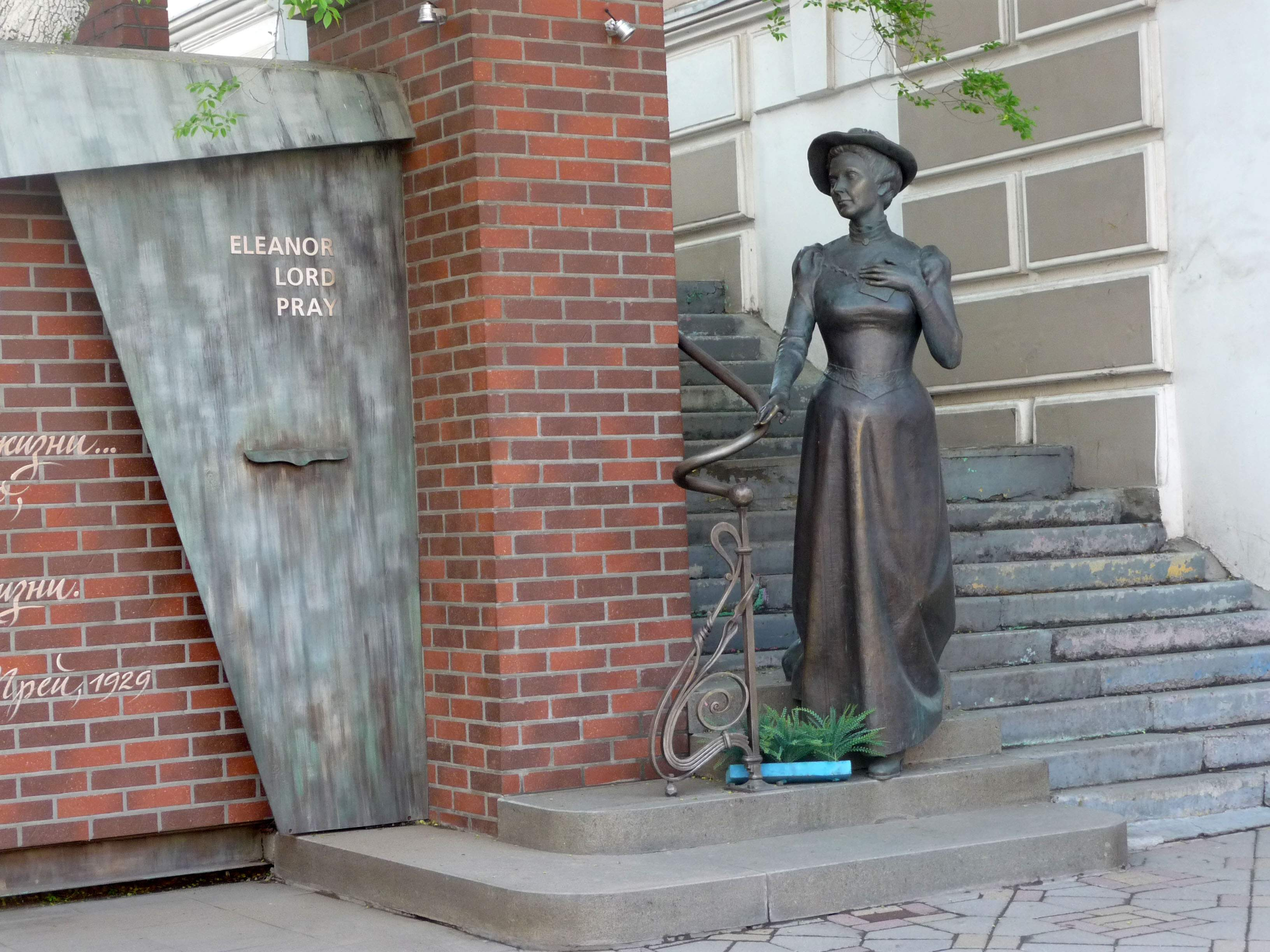 Владивосток, памятник Элеоноре Прей, 2015-05-22